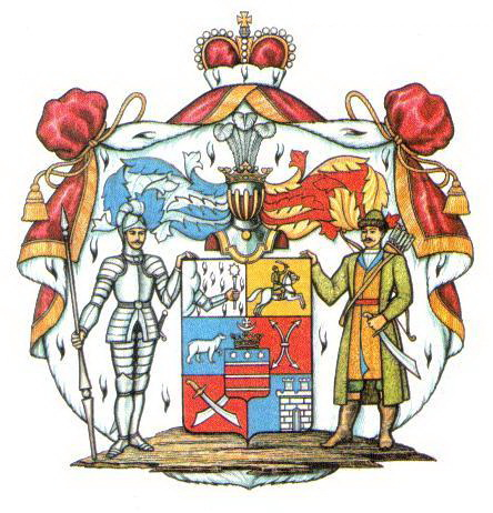 Герб рода Дондуковых-Корсаковых